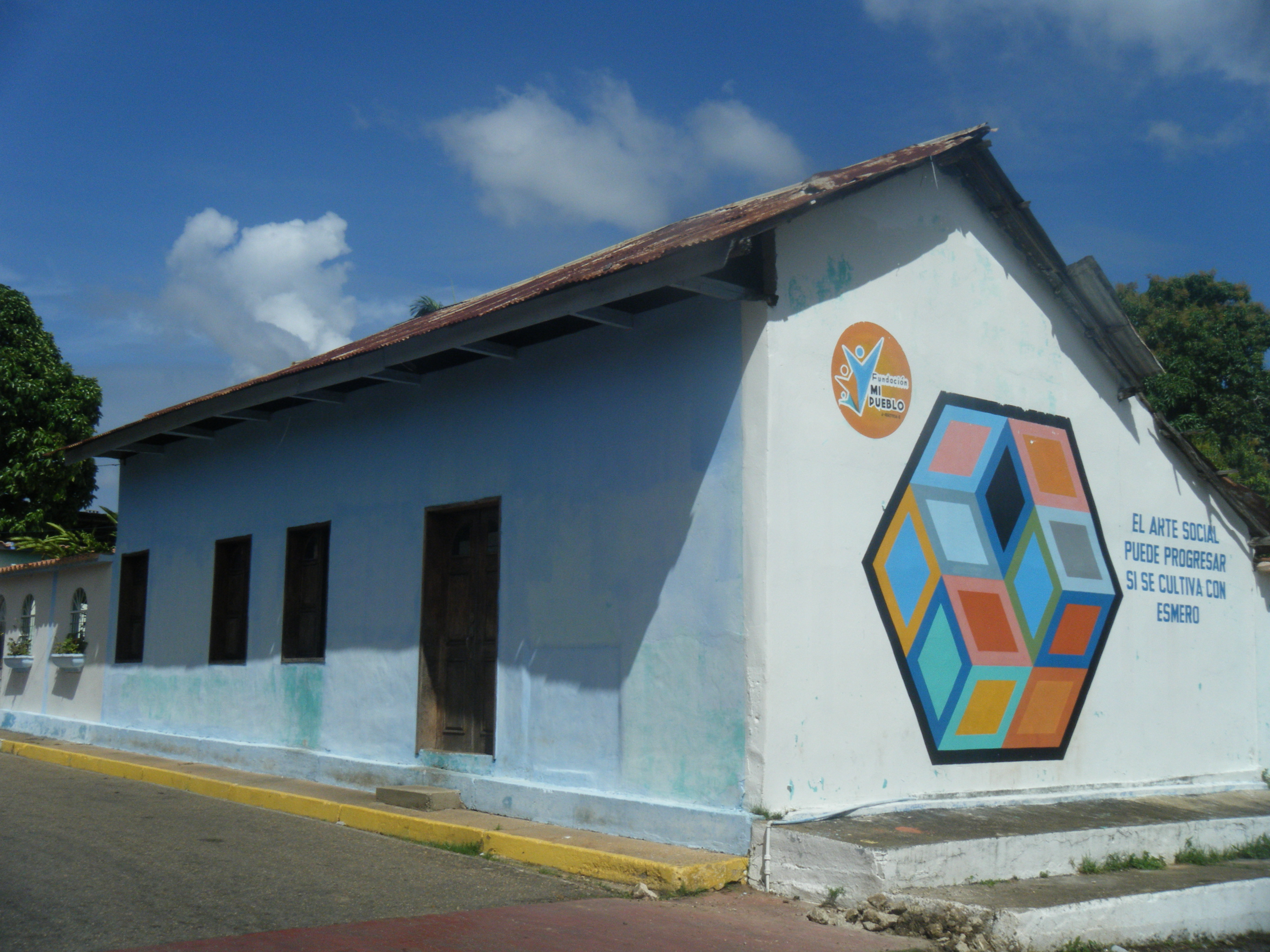 Casa vieja en Santa Bárbara, Monagas